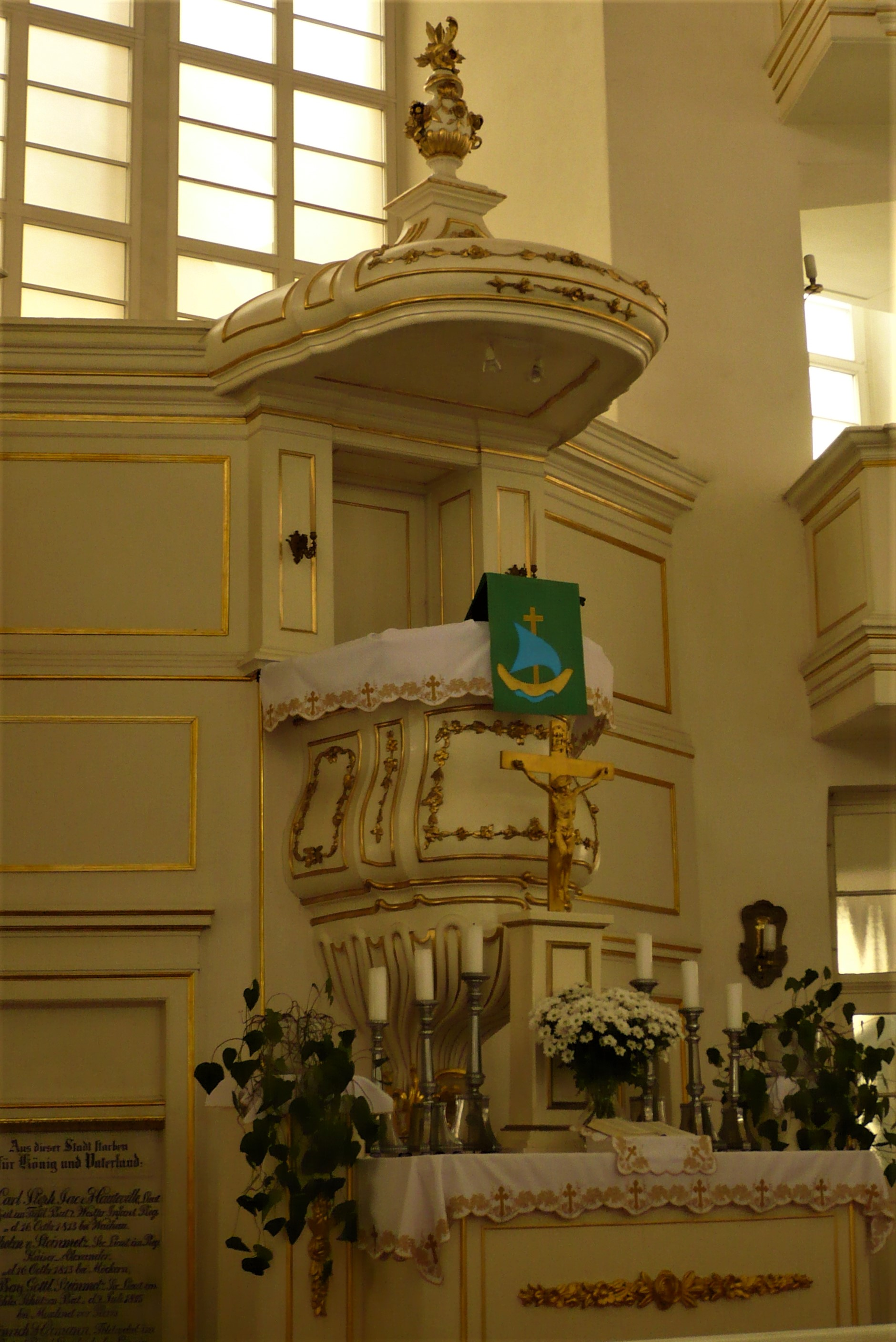 Kościół Opatrzności Bożej we Wrocławiu